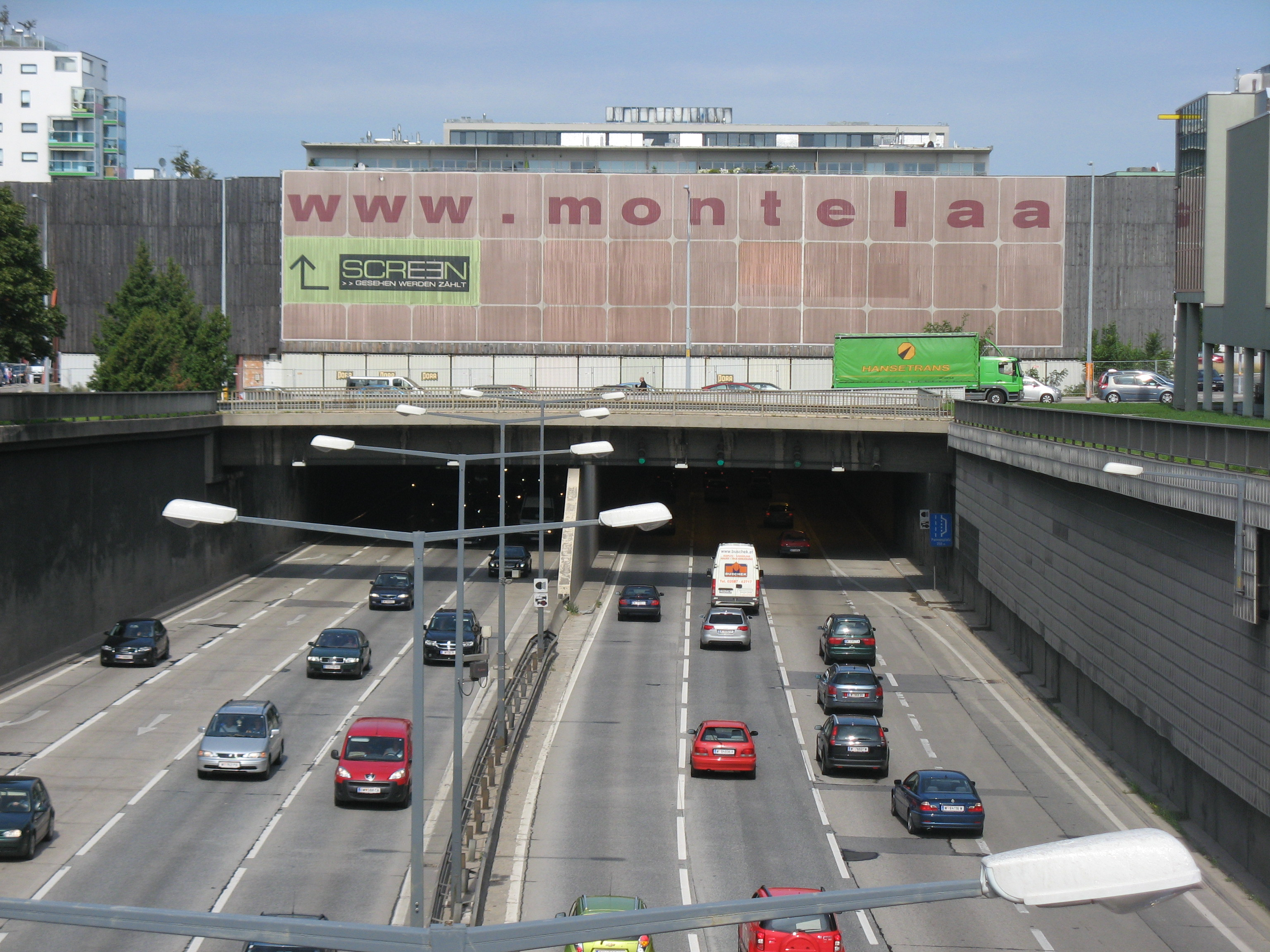 Autobahn Südosttangente Wien mit Monte Laa